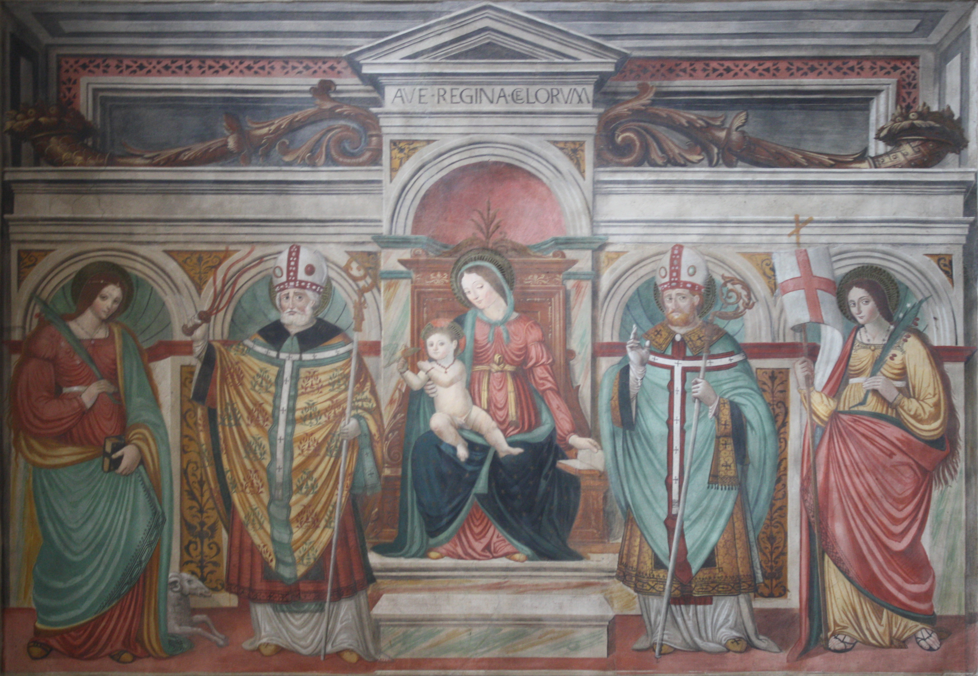 L'interno della basilica di San Magno a Legnano - Cappella di Sant'Agnese - Affresco di Giangiacomo Lampugnani del XVI secolo raffigurante la "Madonna in trono e Santi"